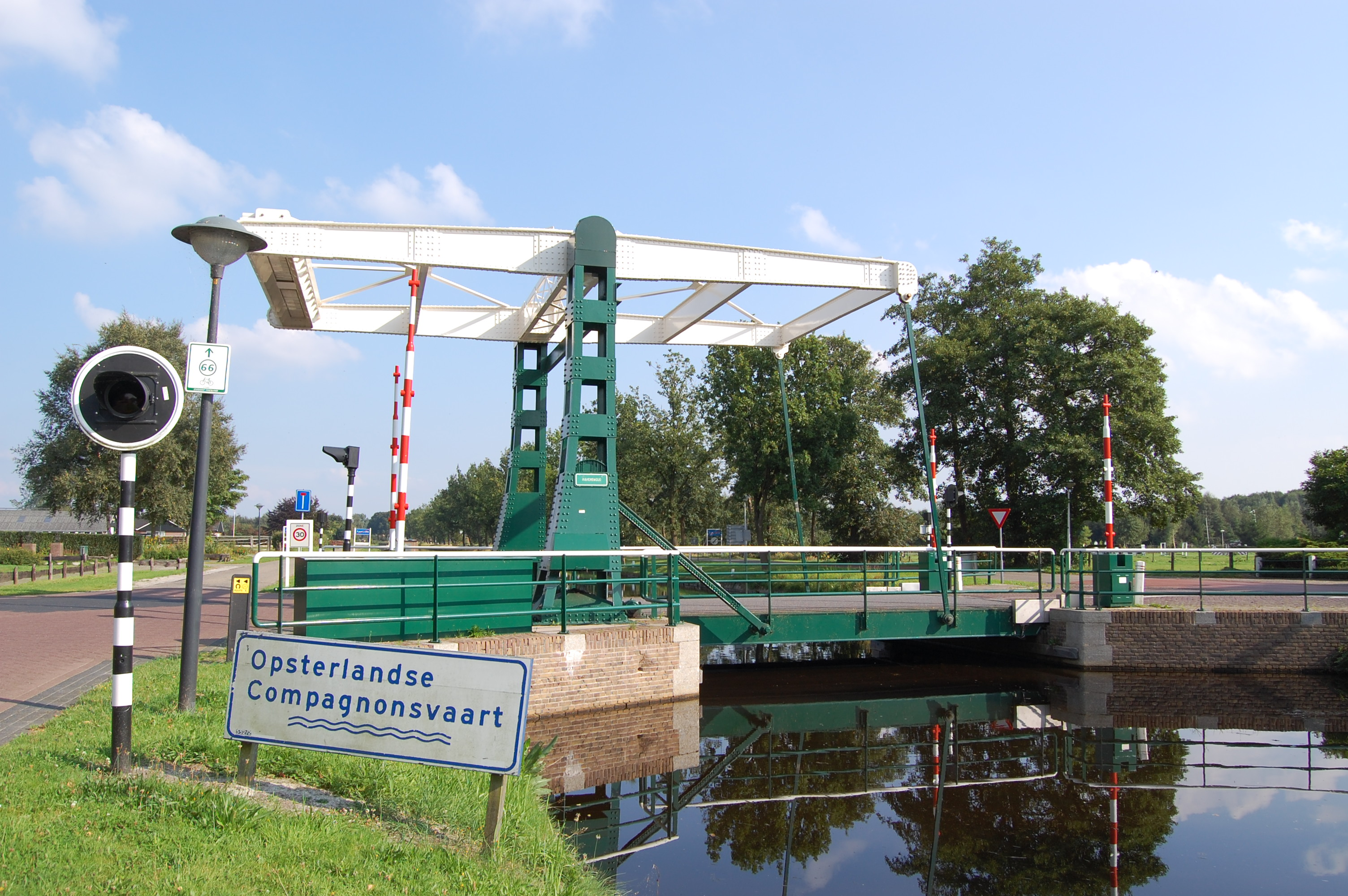 Brug Ravenswoud over de Opsterlandse-Compagnonsvaart.